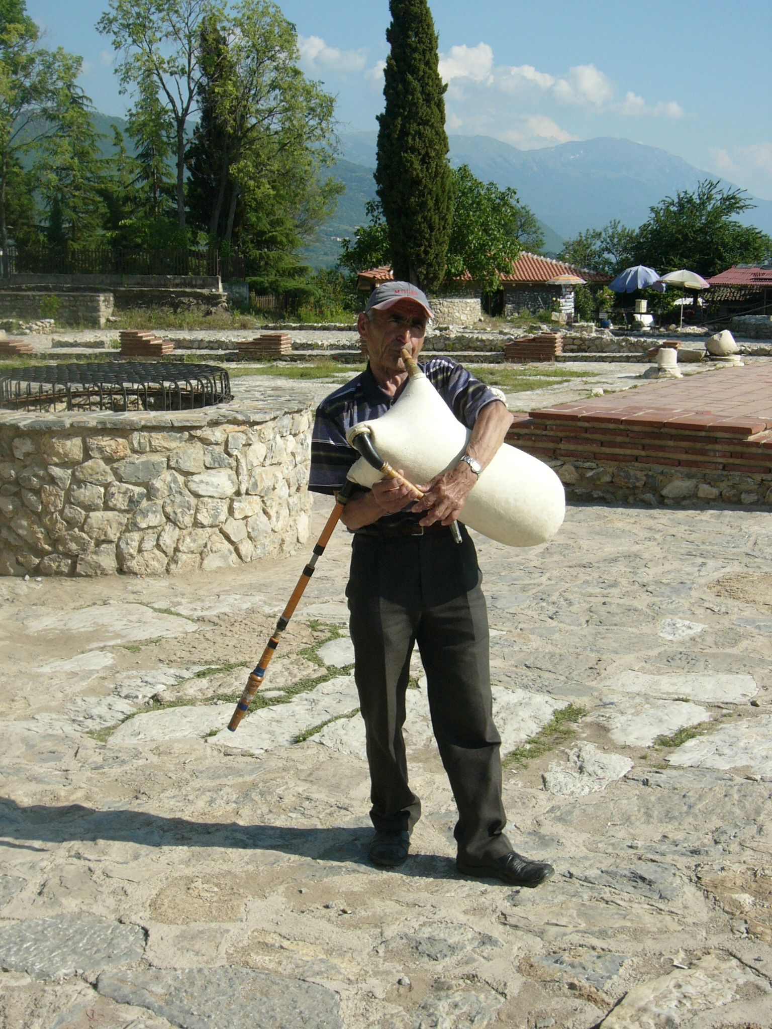 Macedonian gajda